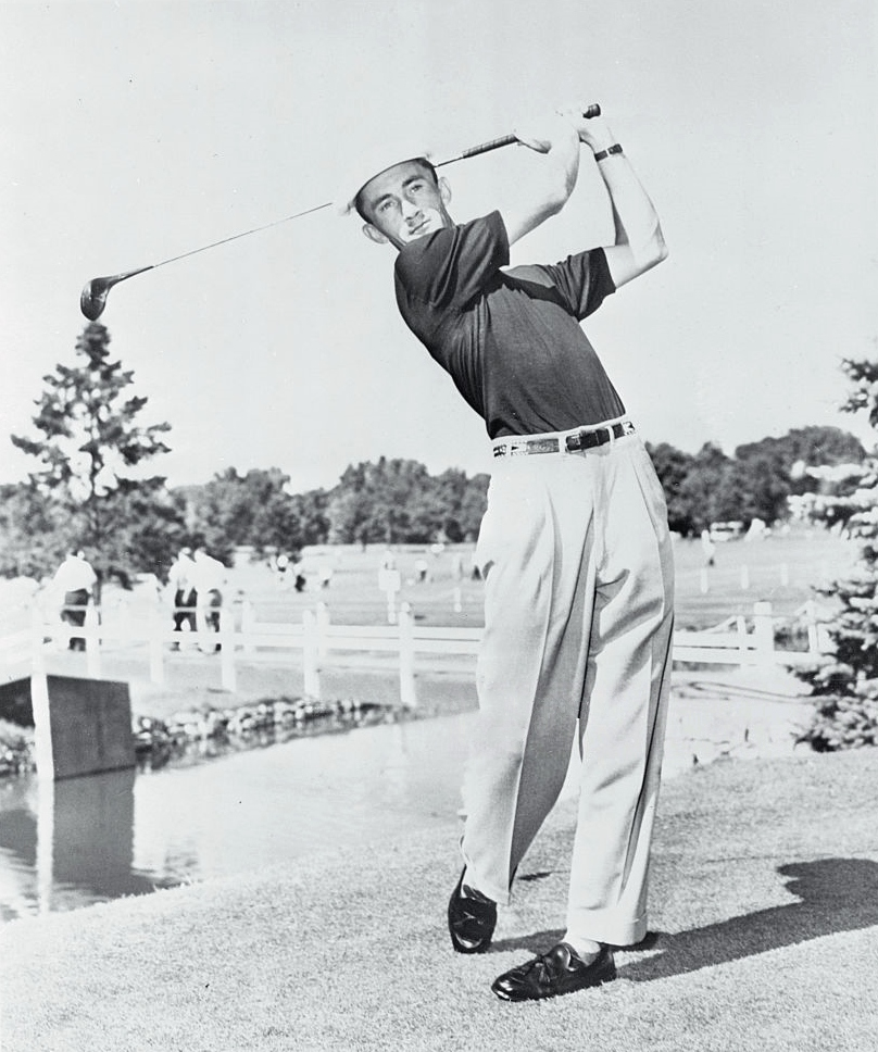 Press Photo Golfer Gardner Dickinson